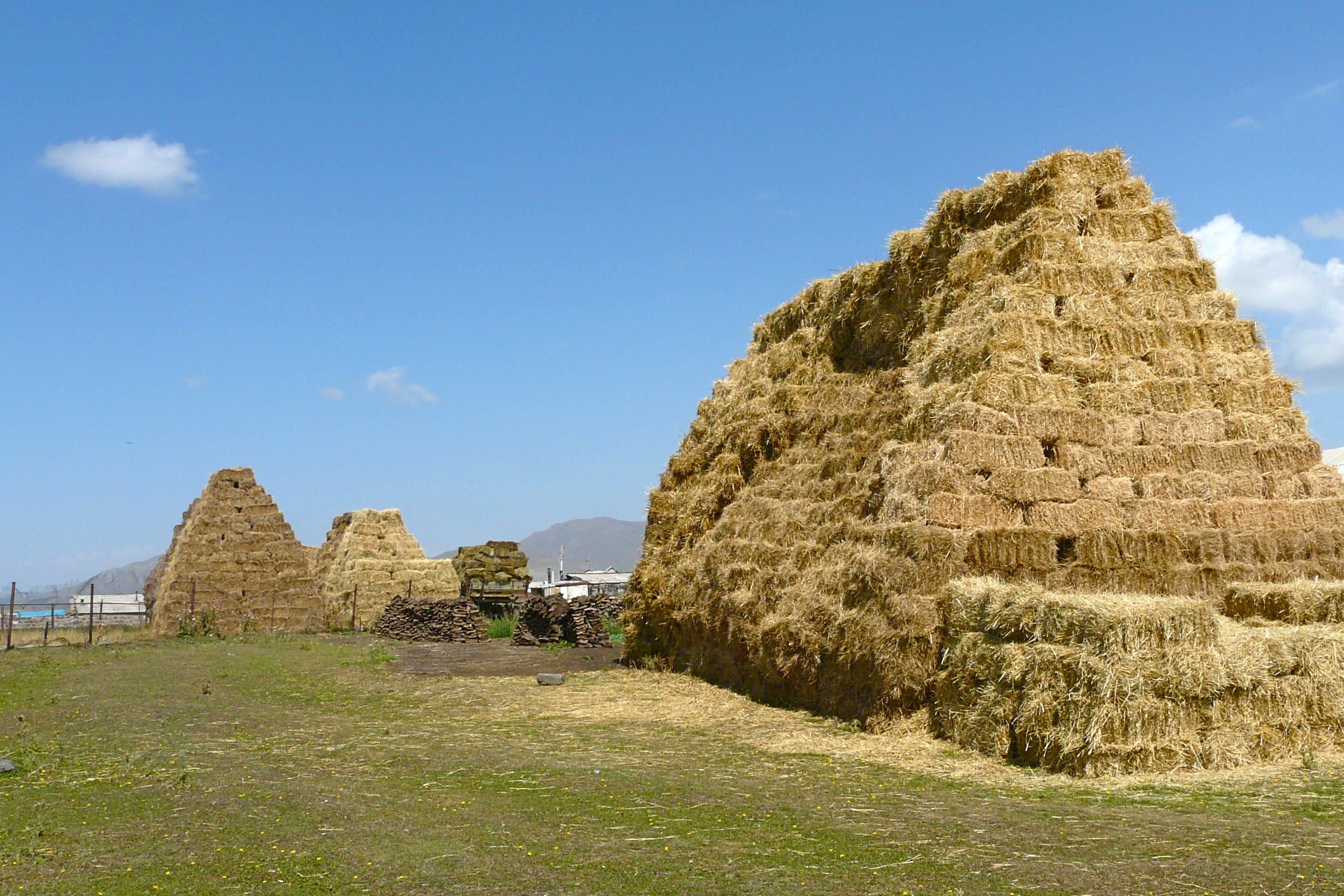 Wandeling door het dorpje Rya Taza.